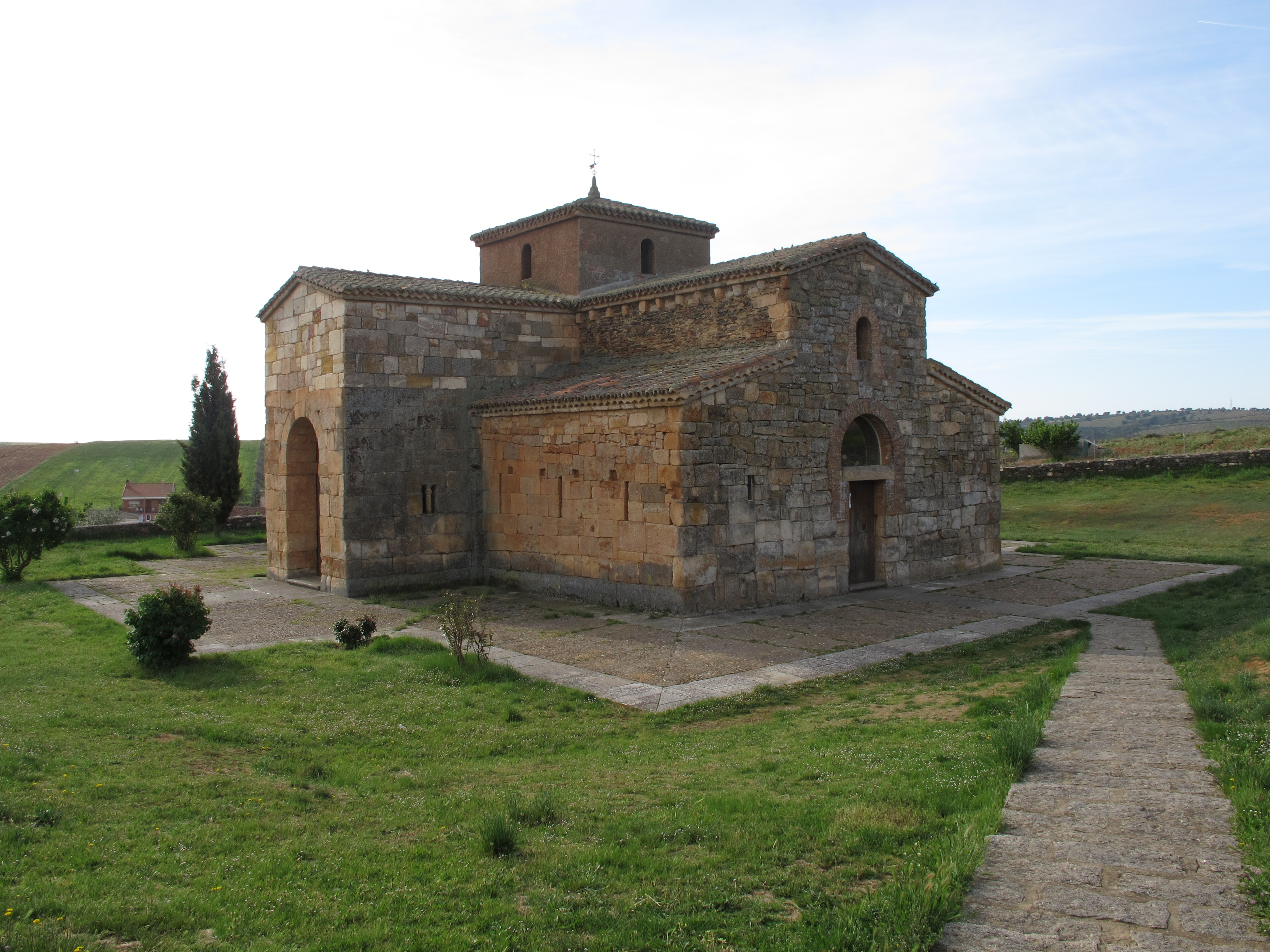 Declarada en 1912 Monumento Nacional . Situada en la Comarca de Tierra del Pan Se considera la culminación constructiva del arte visigótico. En 1926 se aprobó el proyecto de la presa de Ricobayo, y en 1929 dieron comienzo las obras de construcción. En el propio decreto de 1926 en que se aprobó el proyecto se estableció ya la obligación del traslado de la iglesia de San Pedro de la Nave, pero no sería hasta el 30 de agosto de 1930 cuando el Ministerio de Instrucción Pública y Bellas Artes emitiera una Real Orden por la que se formalizaban las condiciones precisas del traslado a la localidad cercana a Campillo La iglesia en su actual ubicación fué trasladada piedra a piedra para no quedar sumergida bajo un pantano sobre el rio Esla quien desmonto, entre los años 1930 y 1932 numero y traslado dicha iglesia piedra a piedra fue Gabriel León Lopez , abuelo de mi marido. con esta foto quiero rendir homenaje a tantos y tantos hombres que han trabajado en cualquier lugar y jamas se les ha sido reconocido su trabajo.